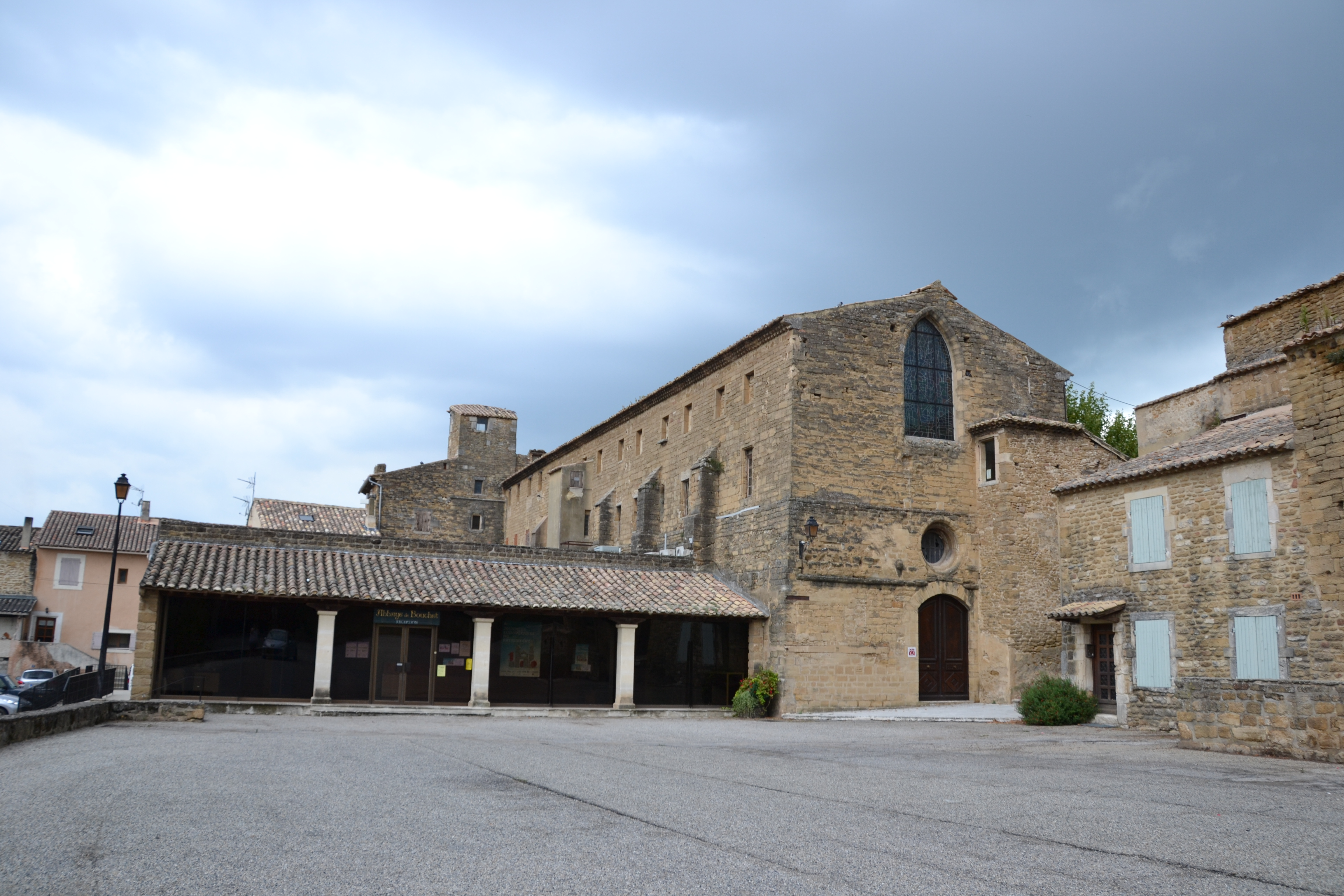 Abbaye de Bouchet (Inscription) .